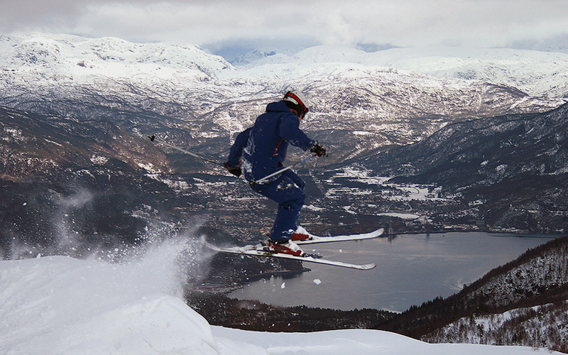 Pudderhopping i Sauda skisenter med utsikt over Sauda sentrum.